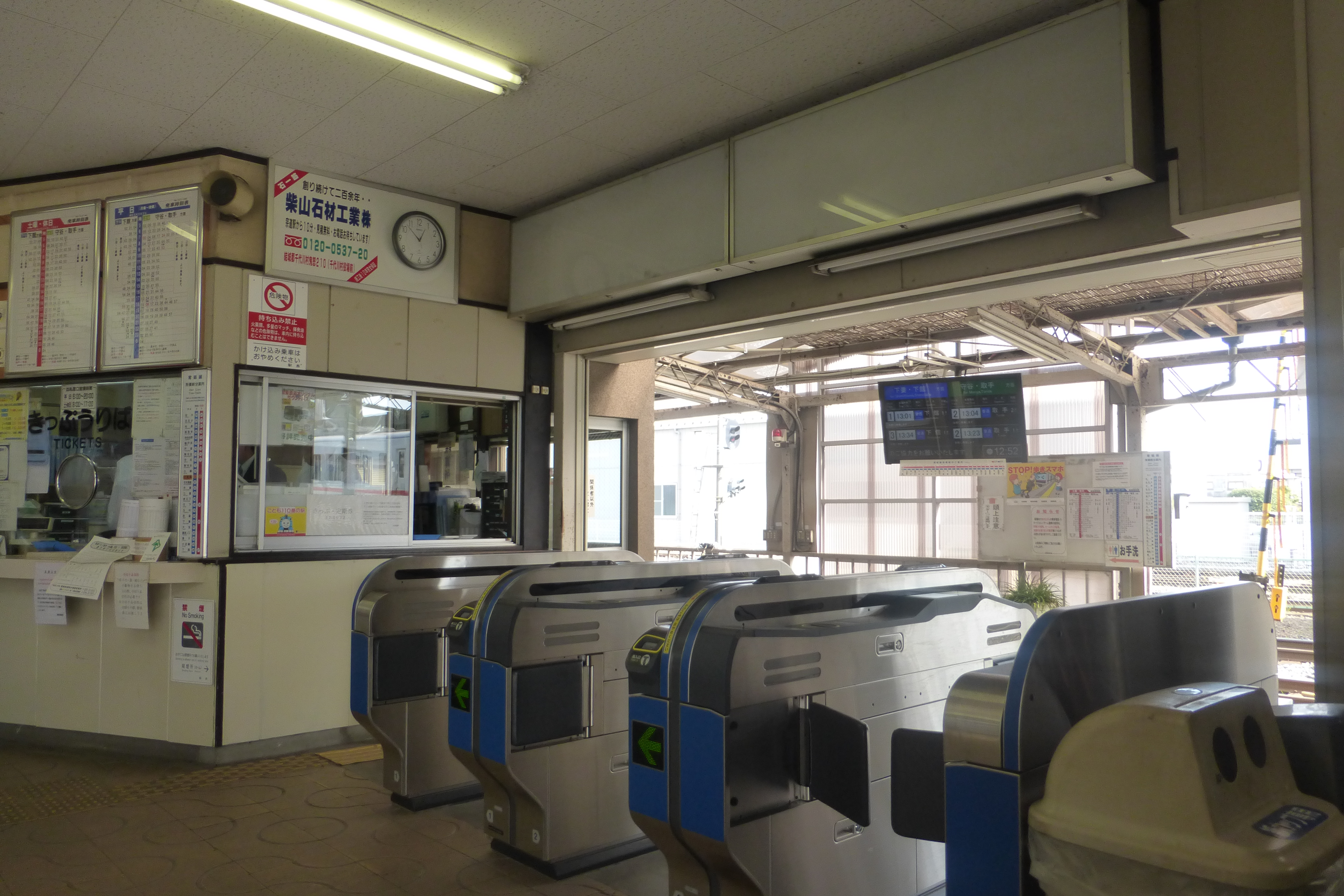 Mitsukaidō Station ticket gates (水海道駅の改札)